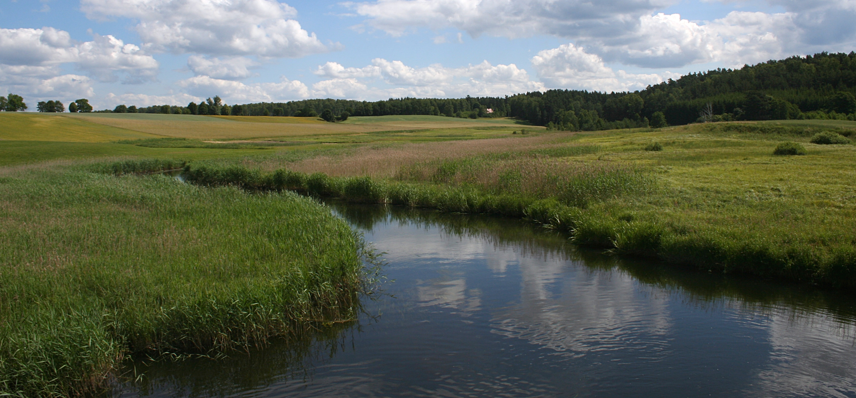 Brda w okolicy miejscowości Ciecholewy, park zaczyna się na linii lasu